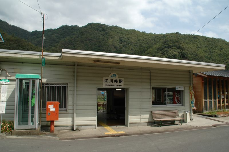 JR-Shikoku YODO-Line,Ekawasaki STA. photo by (2005.9.19)